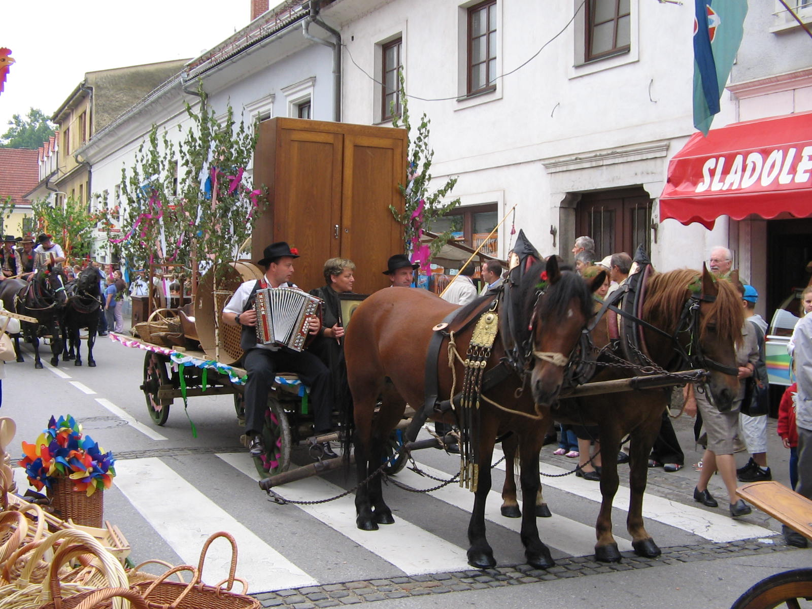 Jahres Market in Ribnica, Slovenija Quelle: eigene Aufnahme 05 Sept. 2005 Fotograf: Janez Novak, Ljubljana, Slovenija